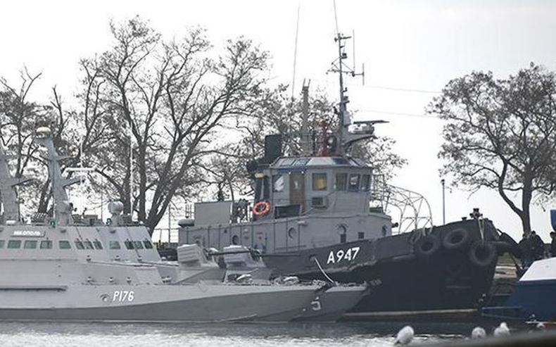 Задержанные корабли на рейде в Керчи